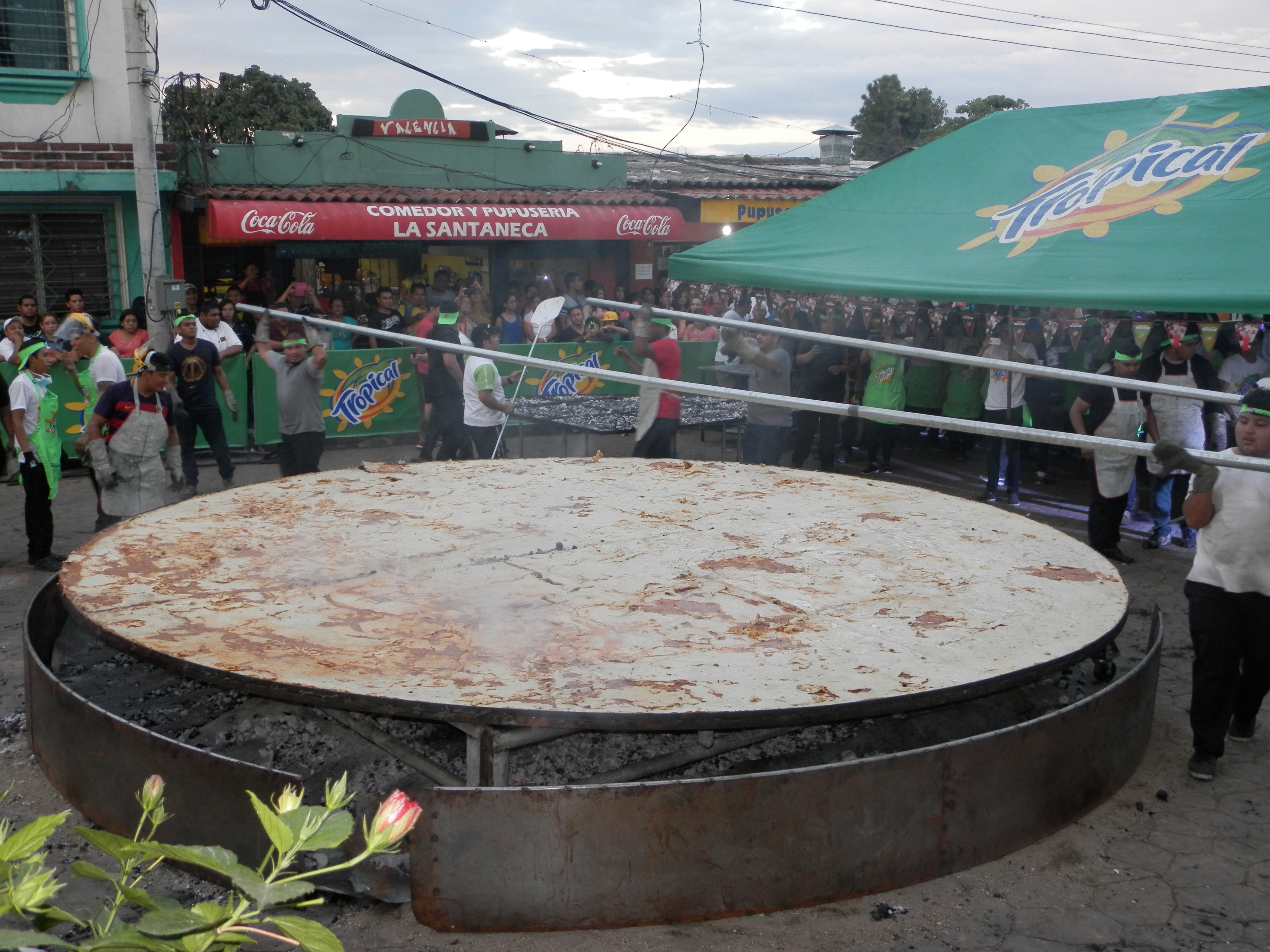 Pupusa de 5.5 mt